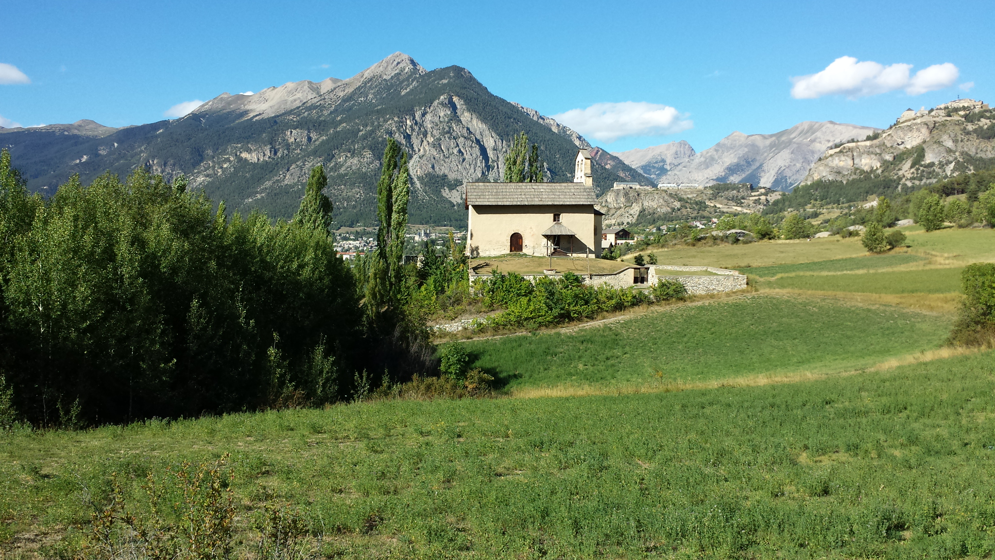 Chapelle des Pénitents de Villar-Saint-Pancrace (Inscrit) .